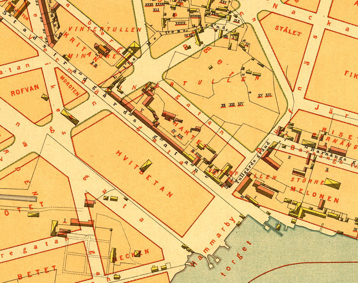 Del av Alfred Rudolf Lundgrens Stockholmskarta visande Vintertullen på Södermalm